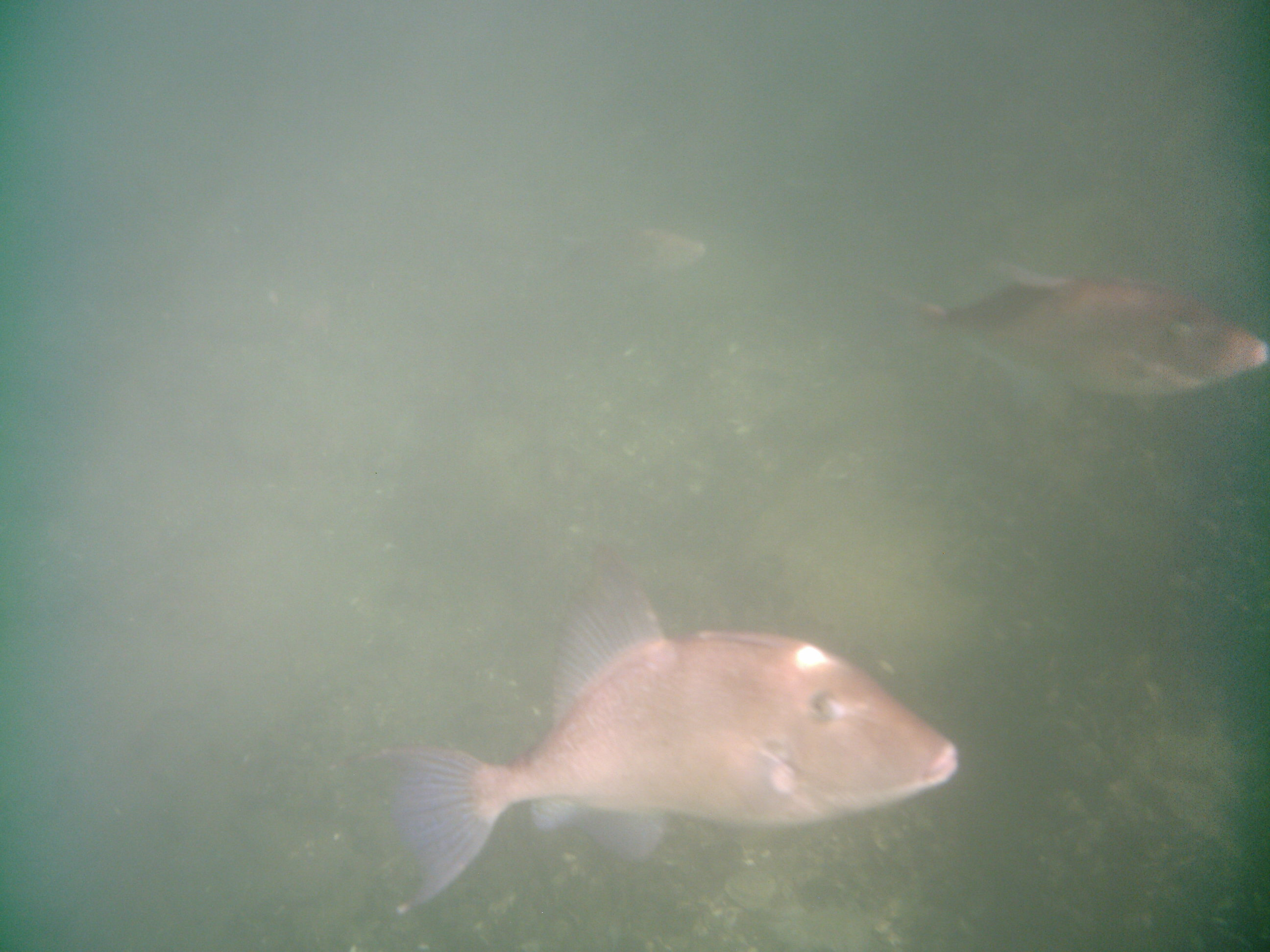 Porquiño ou roncón, visto en mergullo